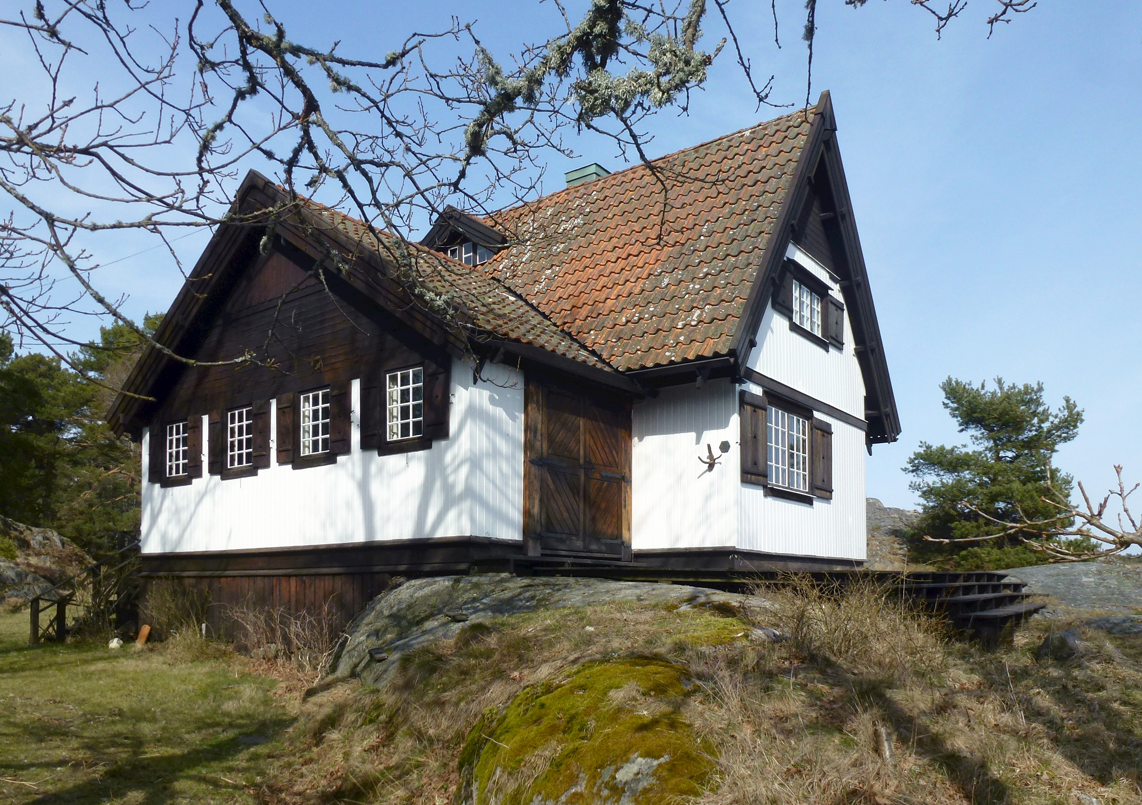 Villa Torsvi, konstnären J.A.G. Ackes sommarvilla på östra Torö i Nynäshamns kommun.